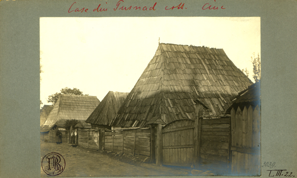 Adler - Case din Tuşnad, jud. Harghita